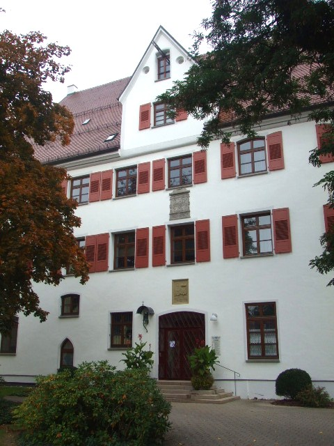 Kloster Untermarchtal, Untermarchtal, Alb-Donau-Kreis, Baden-Württemberg Mutterhaus St. Agnes (ehem. Schloss)